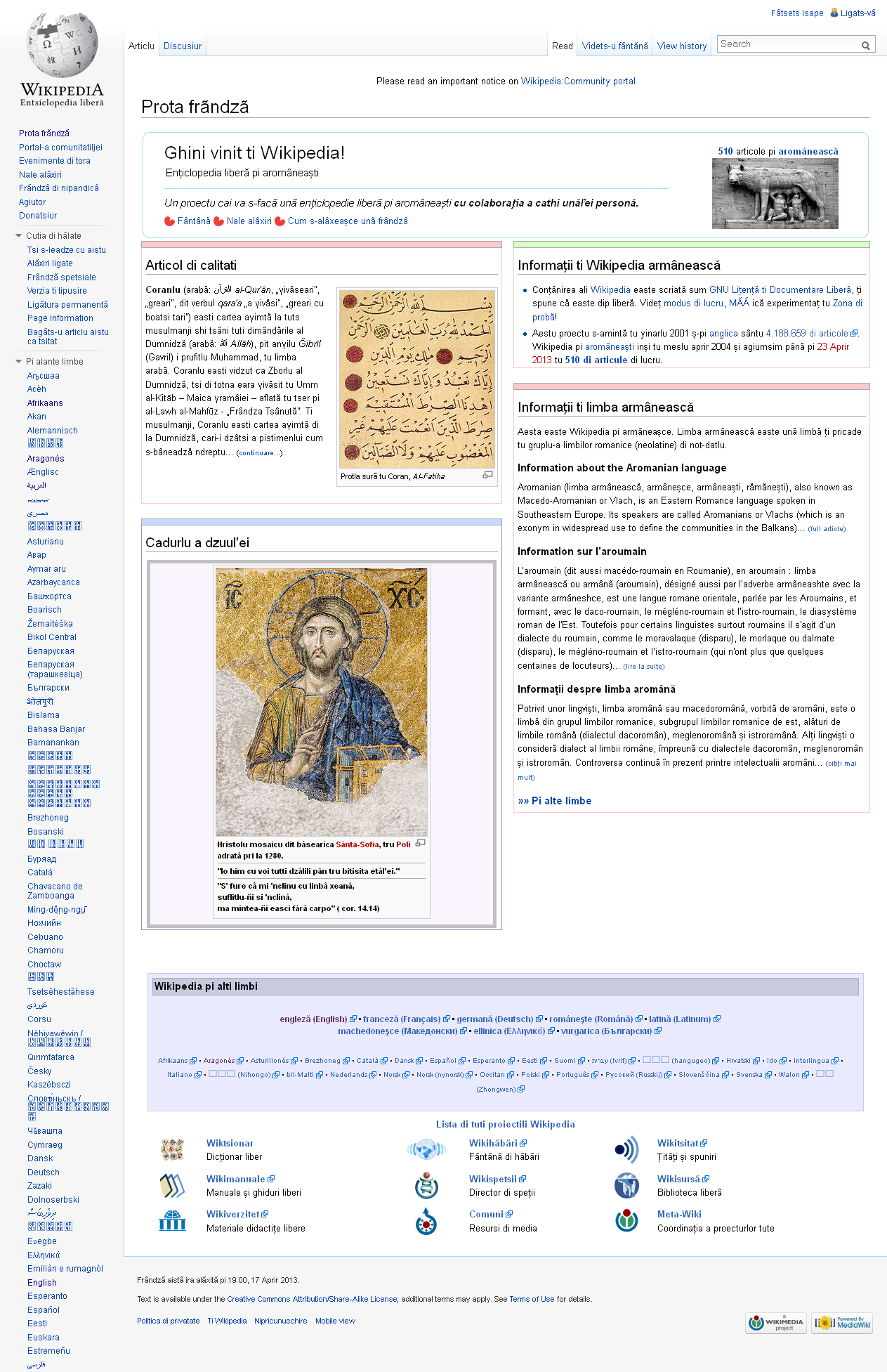 Screenshot - Hlavní strana Arumunské Wikipedie ze dne 25. dubna 2013